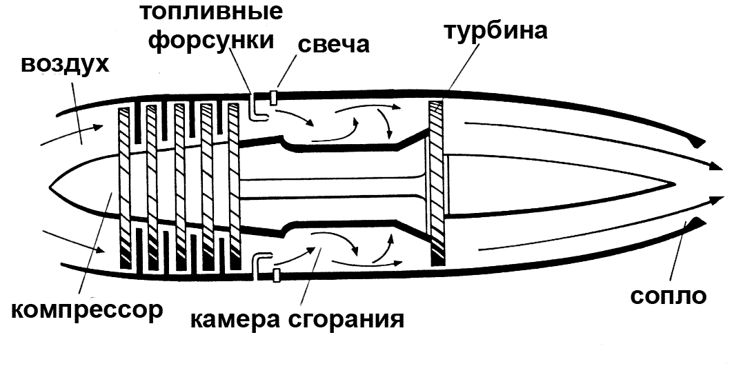 Принципиальная схема ГТД